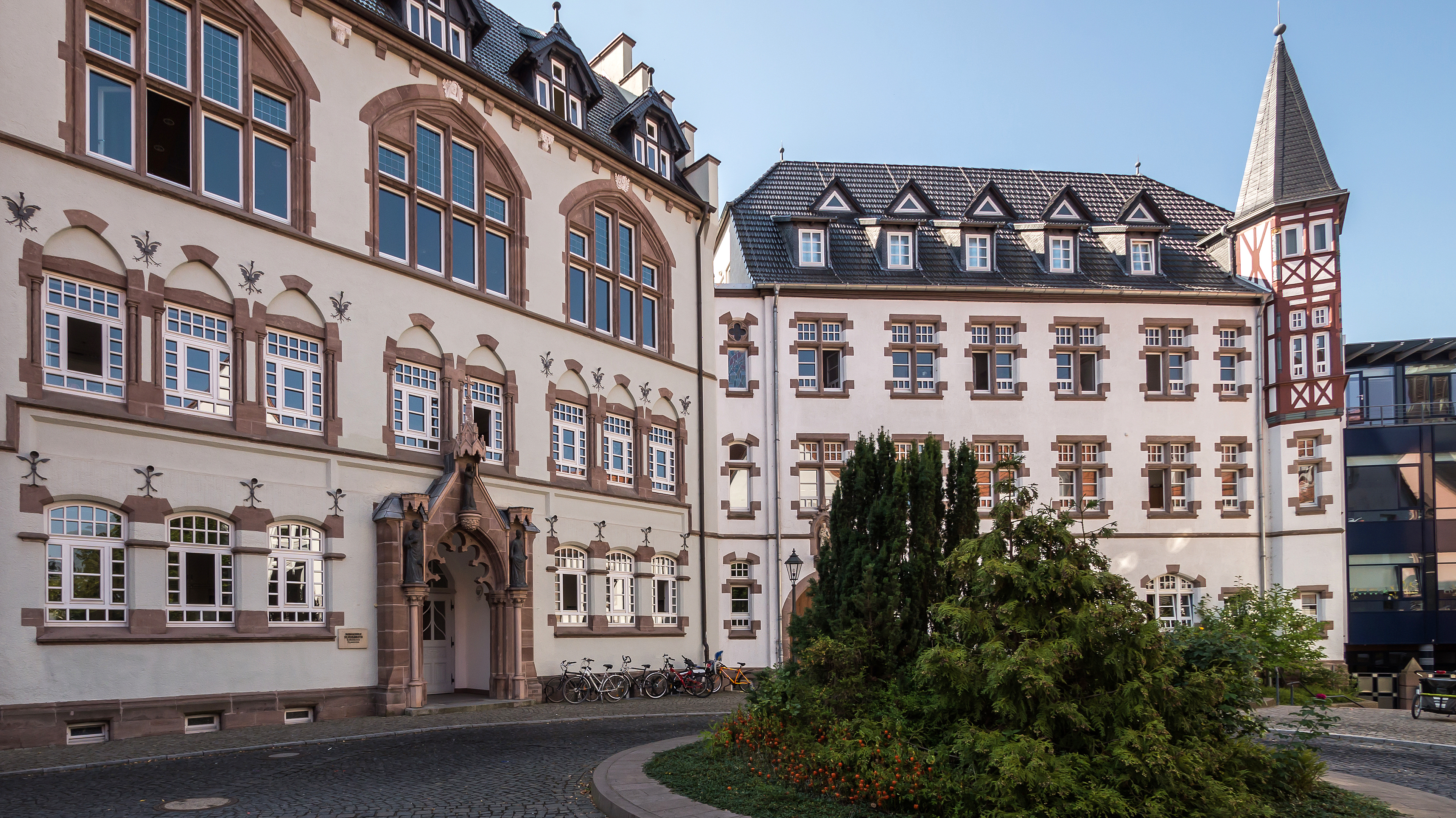 Heilbad Heiligenstadt Friedensplatz 5 Bergschule St. Elisabeth 8